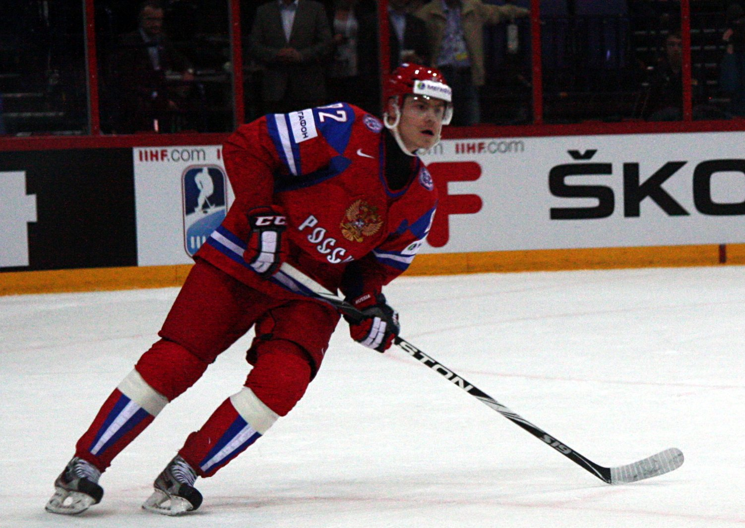 Евгений Медведев. ЧМ 2012, Полуфинал, 19.05.2012, Финляндия-Россия, Хельсинки.